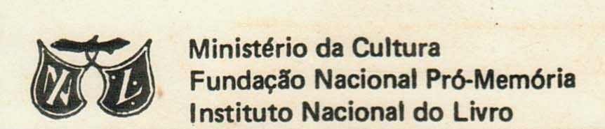 Timbre ex-librico do Instituto Nacional do Livro.